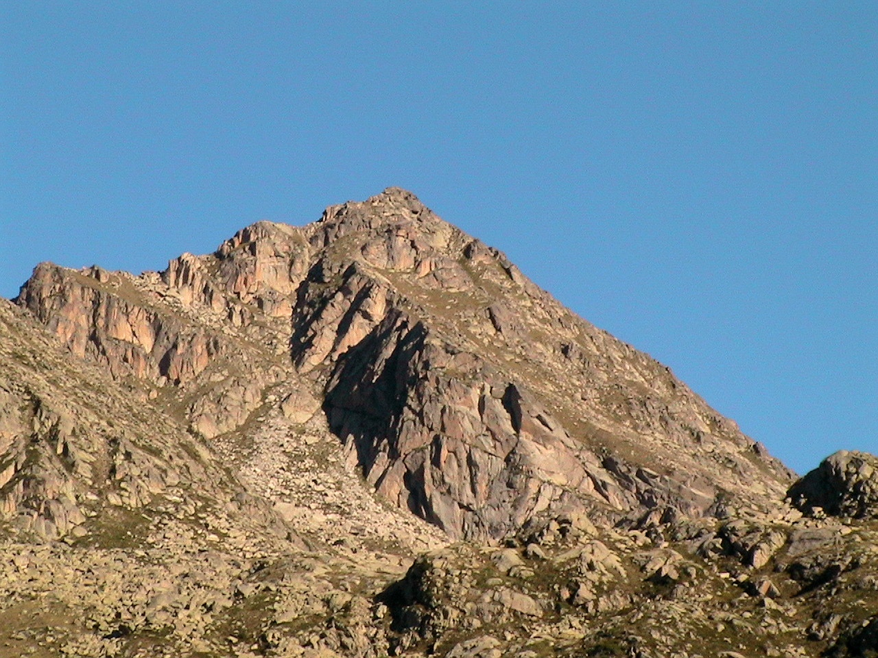 Cim del Pic Fosser, pujant la Canal de Pígolo, a Cabdella ( Vall Fosca - Pallars Jussà)